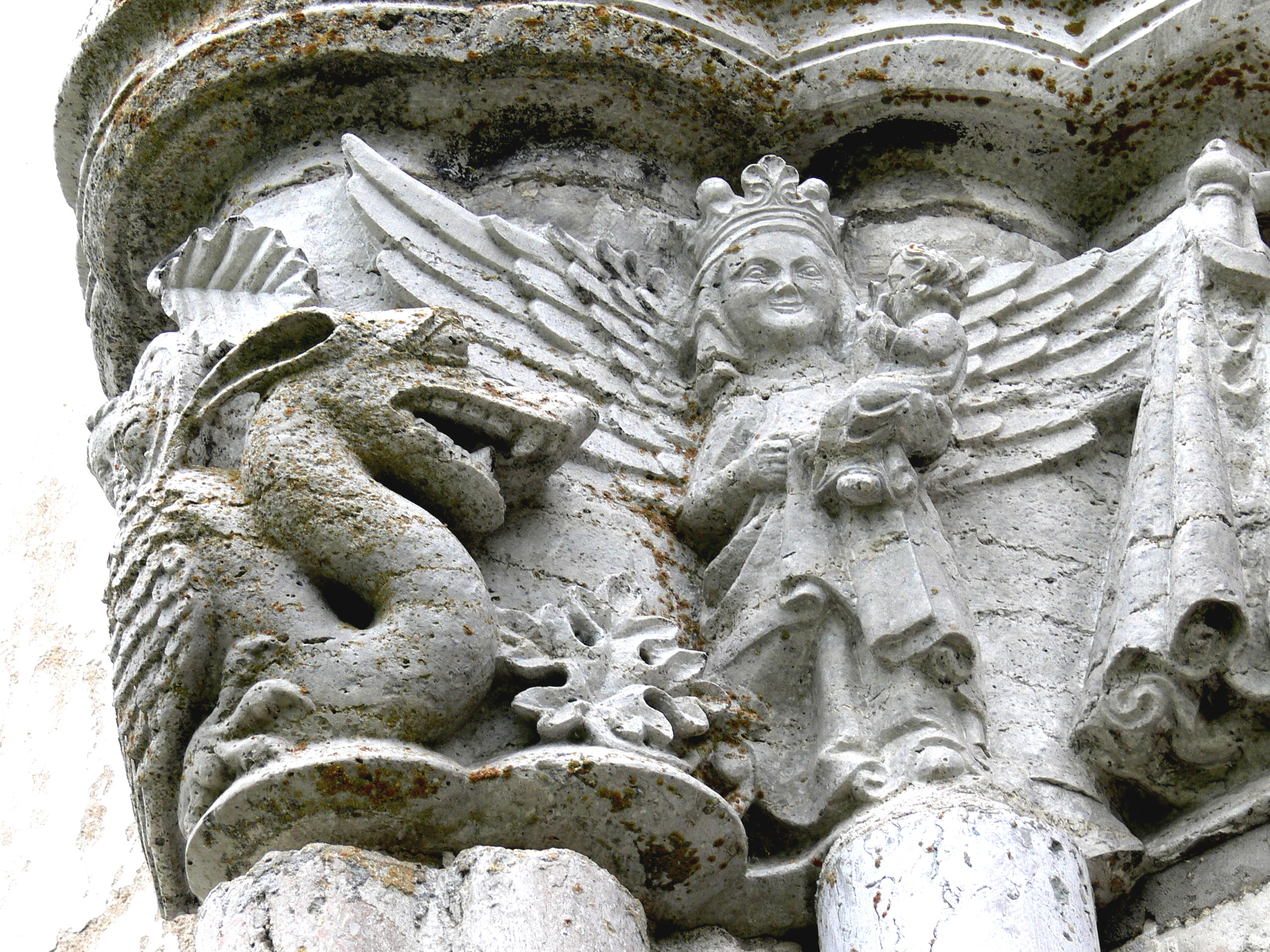 Hörnse kyrka auf Gotland. Portal - Szenen aus der Apokalypse: Madonna mit Kind und Drachen